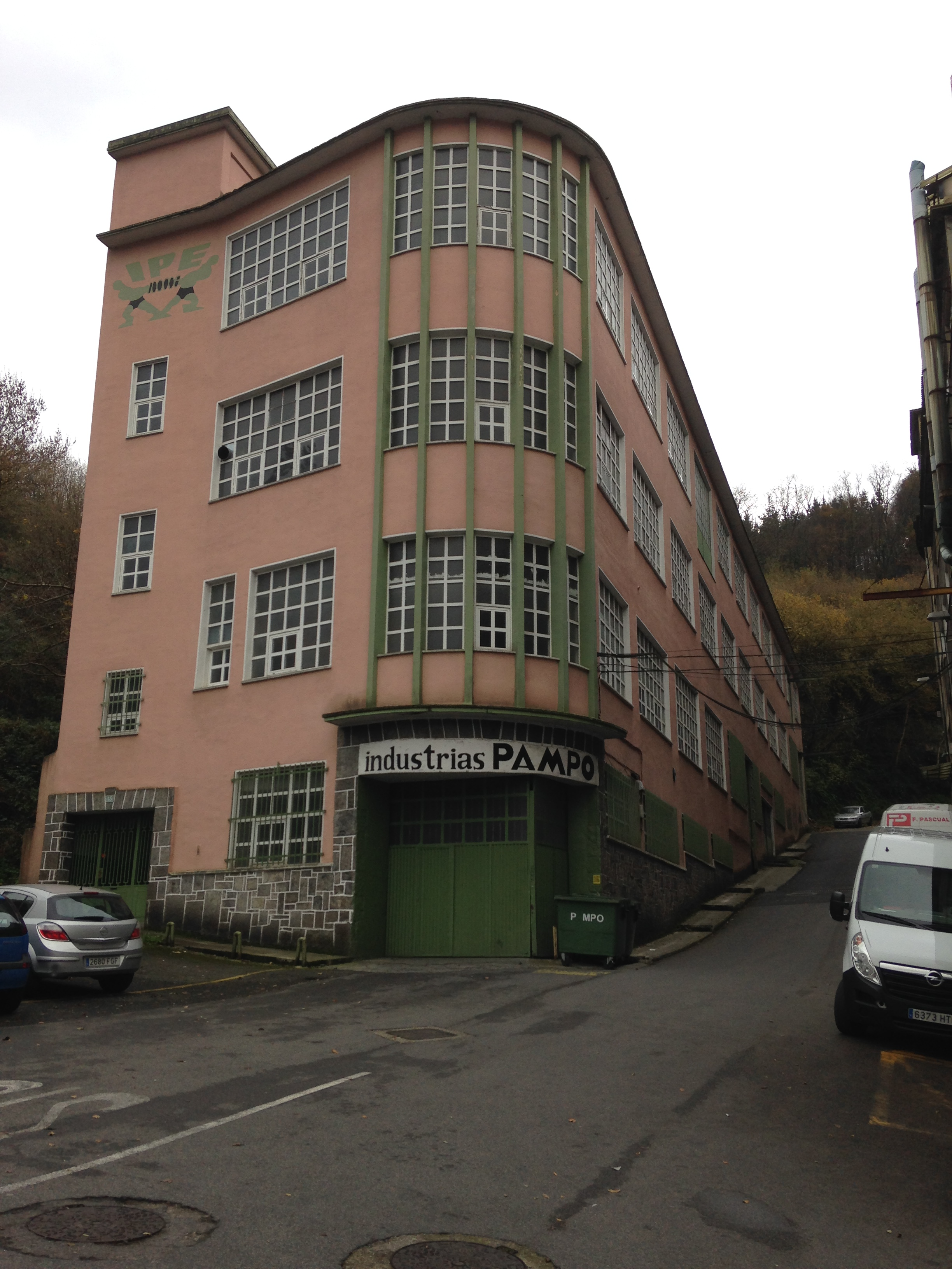 Edificio industrial en Eibar Guipúzcoa (País Vasco España)